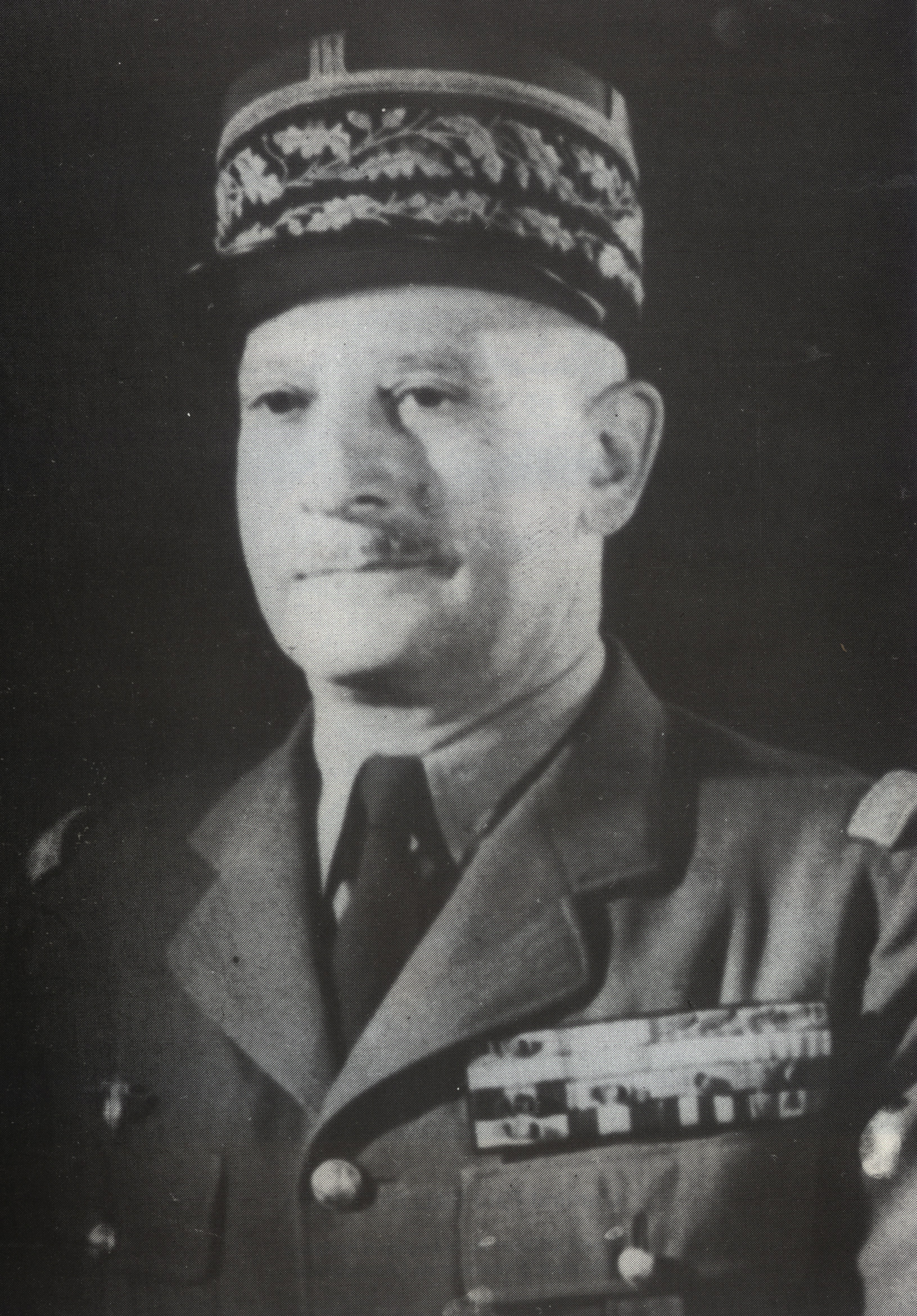 Portrait du général franço-russe Zinovi Pechkoff